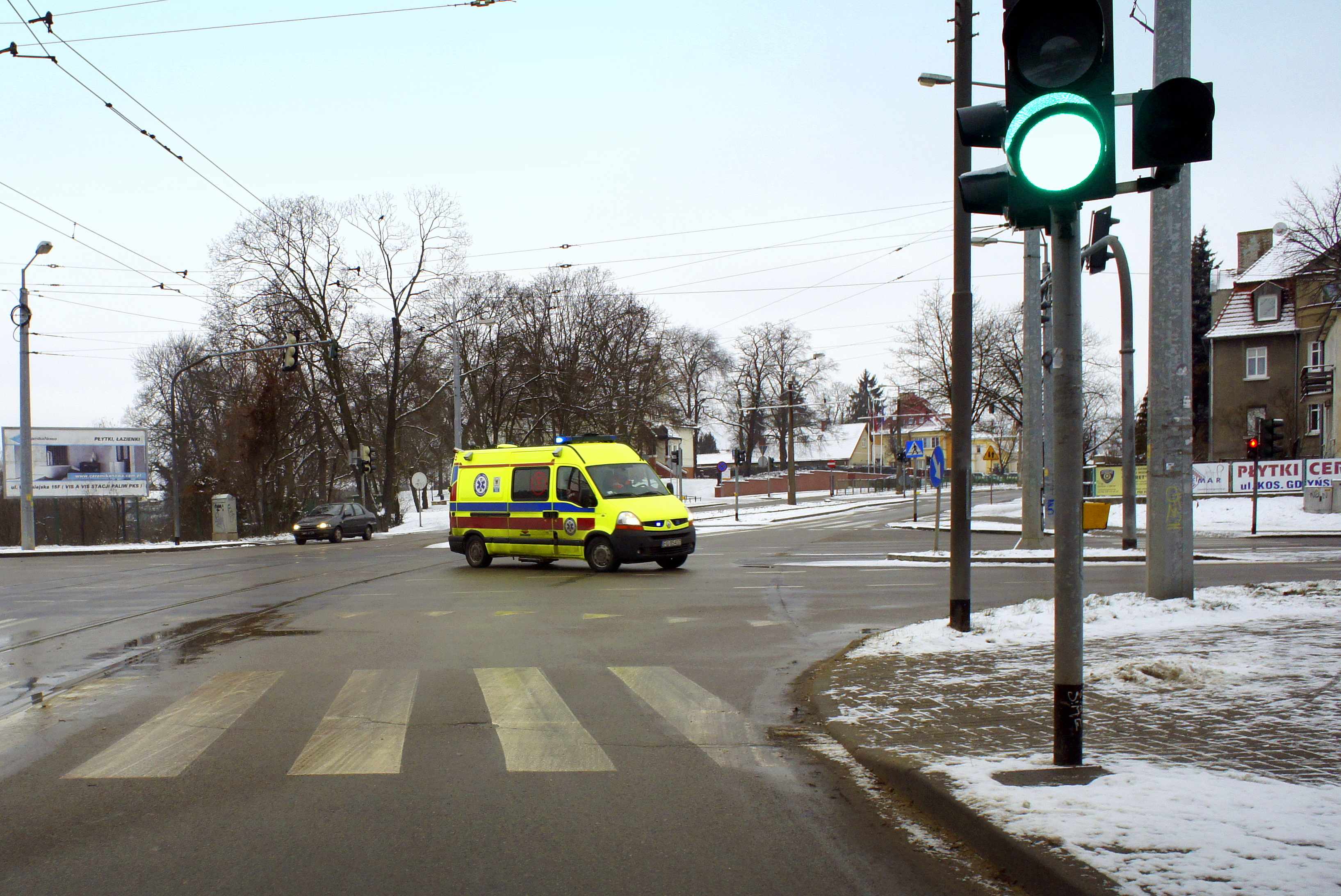 Ambulans zespołu ratownictwa medycznego wysyłający sygnały dźwiękowe i świetlne - jako pojazd uprzywilejowany